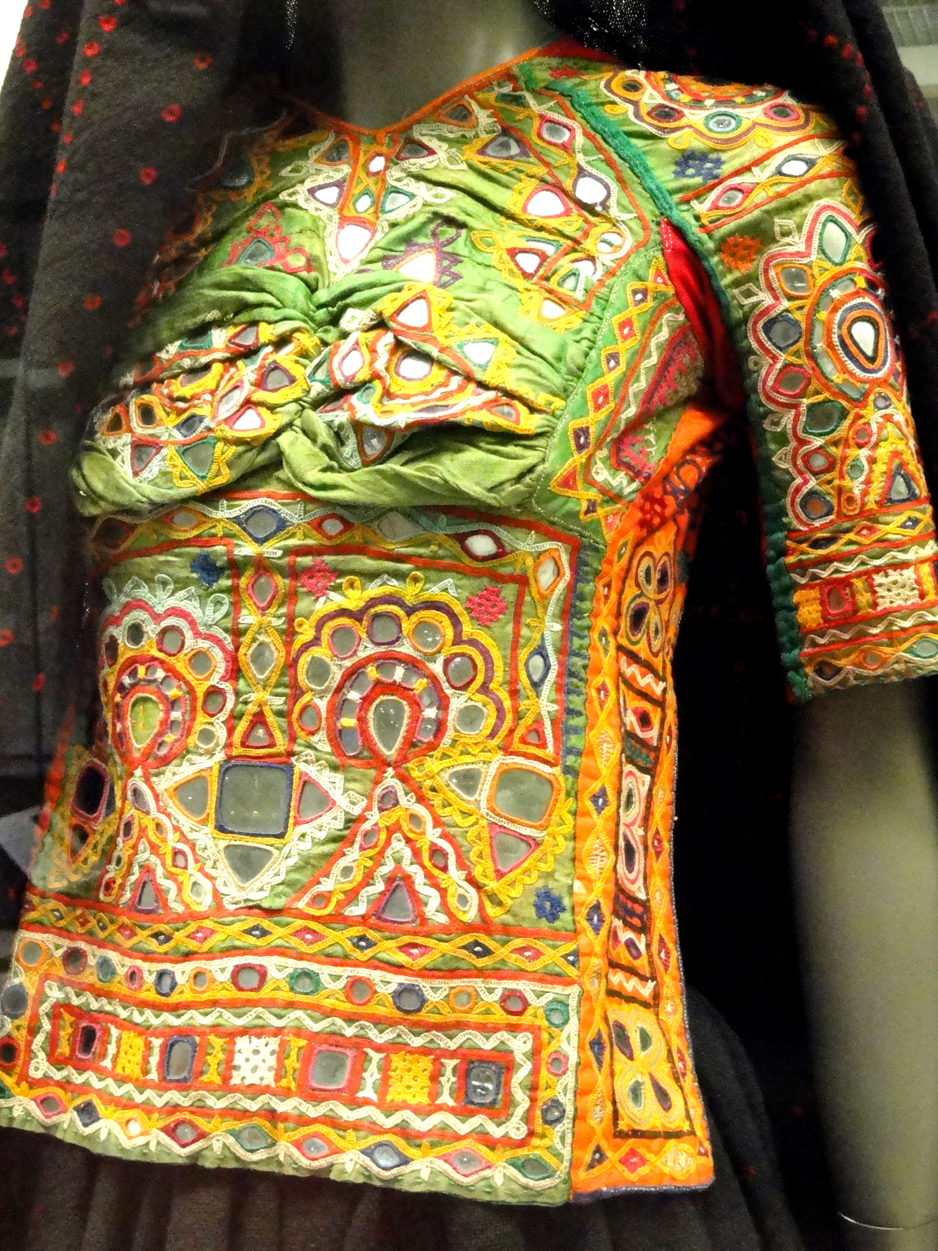 Exhibit in Bunka Gakuen Costume Museum, 3-22-7 Yoyogi, Shibuya-ku, Tokyo, Japan.